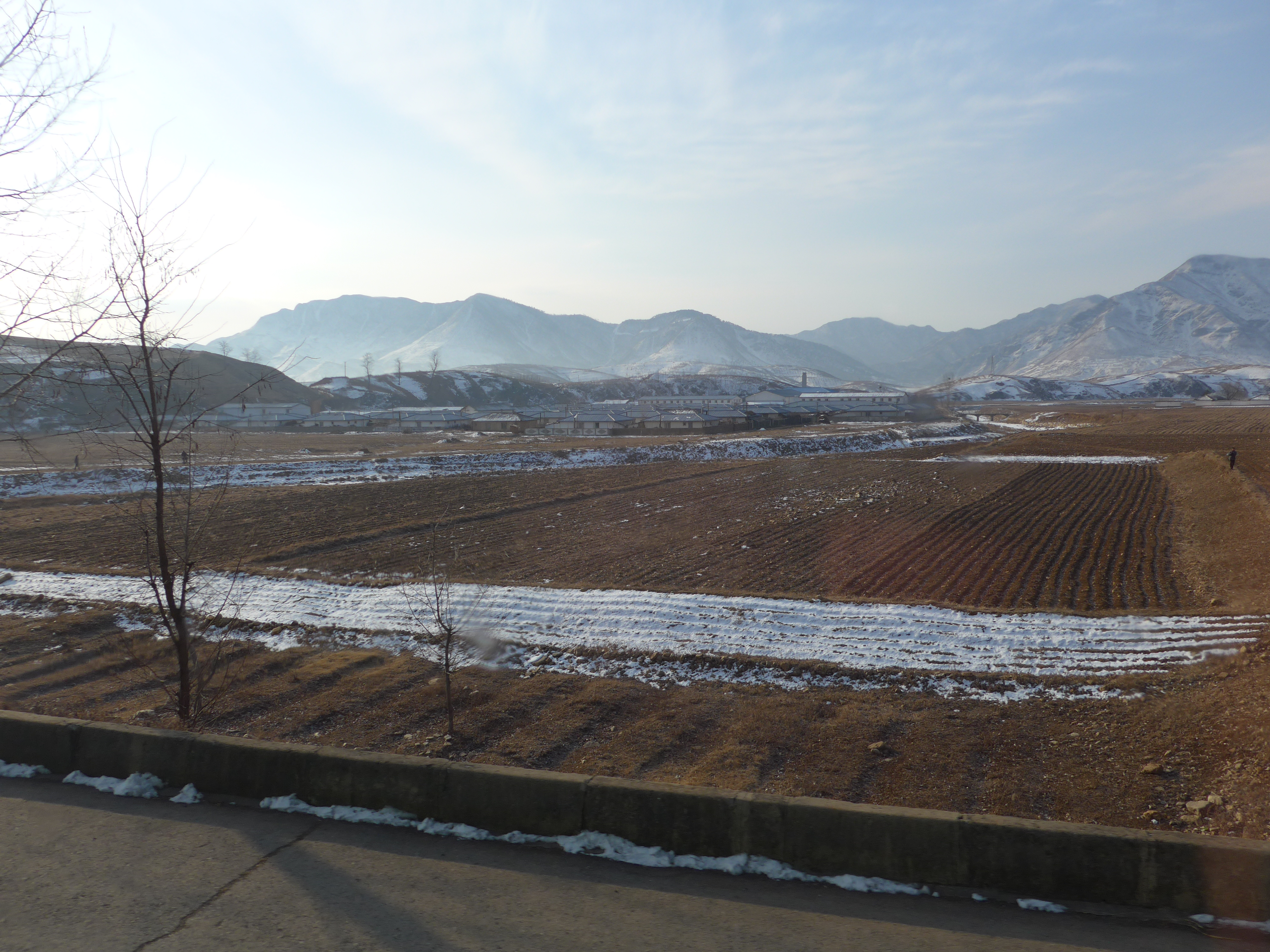 Pyongyang - Kaesong Hwy, North Hwanghae, North Korea